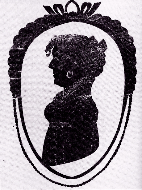 Catharina Rebecca Sophia Möllmann, geb. Gerding, Gattin von Pastor Bernhard Möllmann Scan eines Fotos eines um 1818 entstanden Scherenschnitts des Silhouetteurs Johann Caspar Dilly